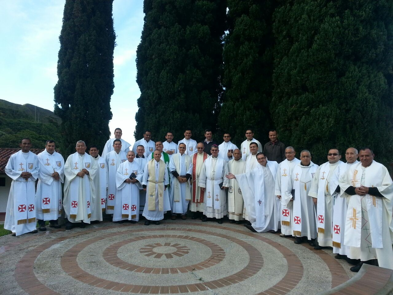 Capellanes militares en los ejercicios espirituales 2016 junto al obispo castrense.